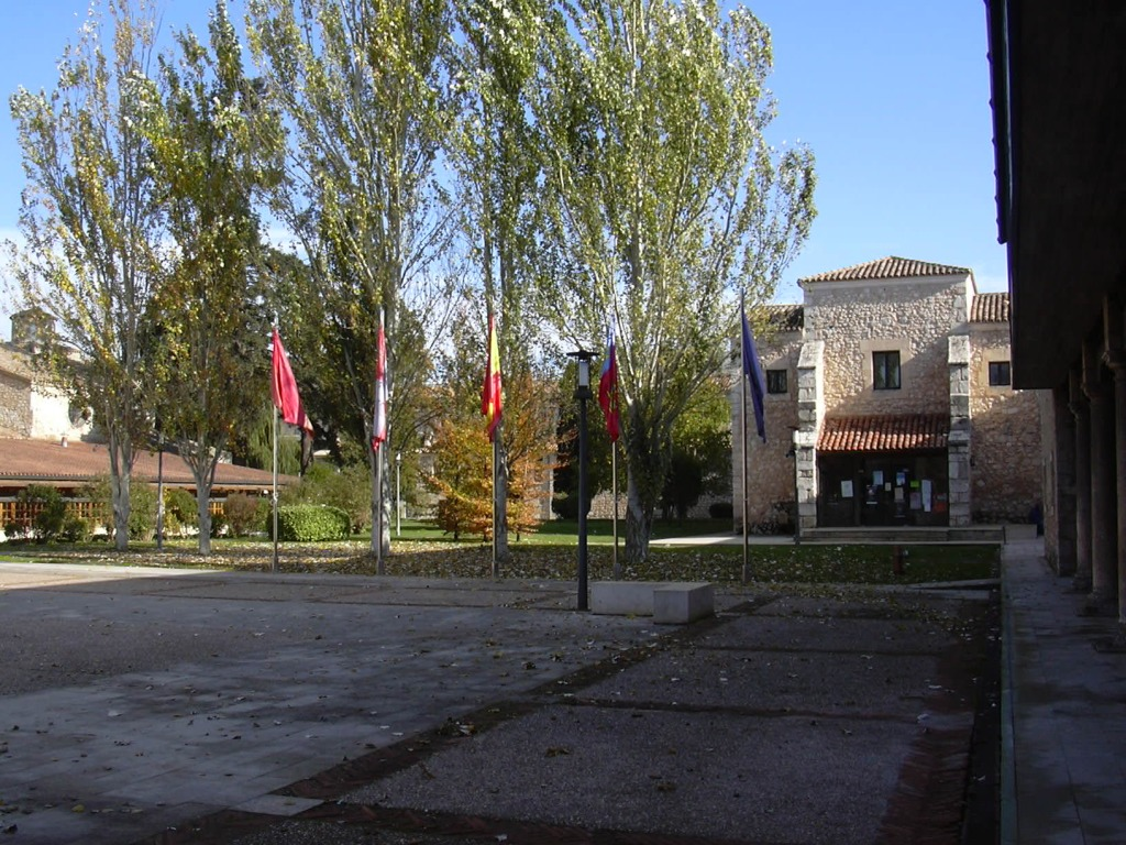 Hospital del Rey - Universidad de Burgos, Burgos, Spain